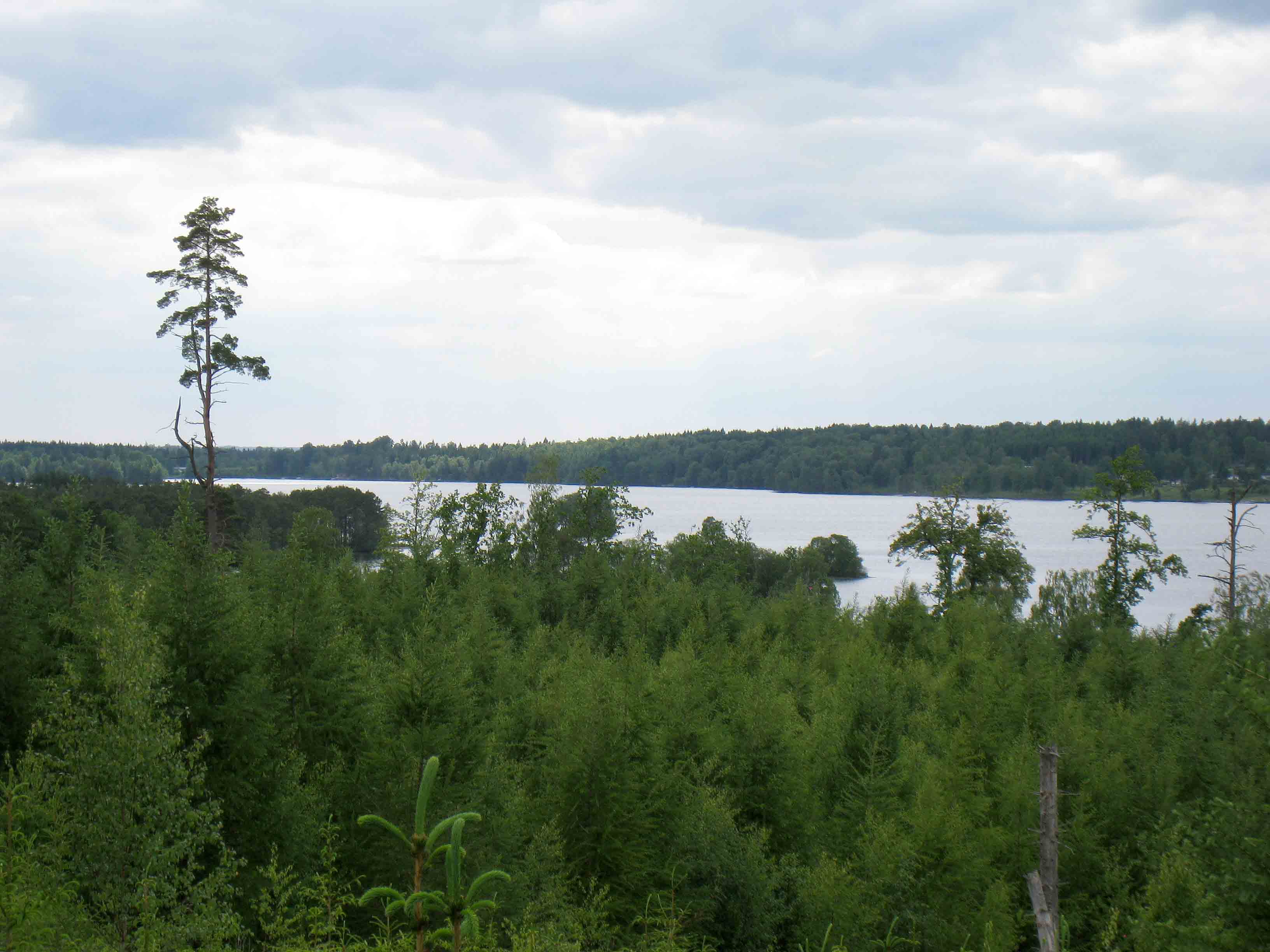 Herrestadsjön från öster